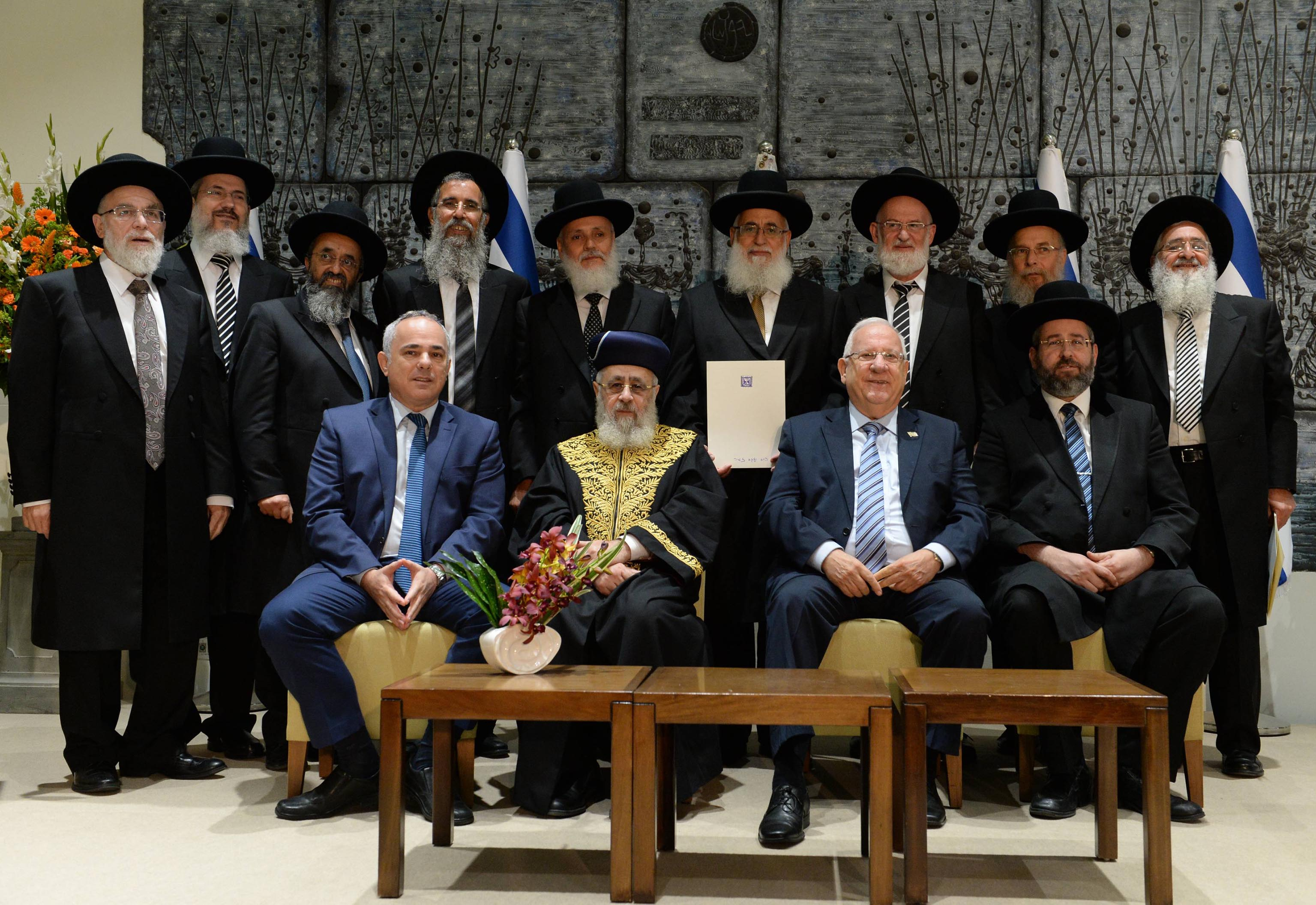 טקס השבעת דיינים לבית הדיו הרבני הגדול בישראל בנוכחות נשיא מדינת ישראל ראובן ריבלין , יושבים ימין לשמאל, הרב הראשי דוד לאו, ראובן ריבלין, הרב הראשי יצחק יוסף, השר יובל שטייניץ, עומדים: הדיינים שנבחרו (מימין לשמאל): הרב מיכאל עמוס, הרב אליהו היישריק, הרב אהרן כ"ץ, הרב יעקב זמיר, הרב יצחק אלמליח, הרב ציון לוז, הרב מימון נהרי, הרב אברהם שינדלר, הרב שלמה שפירא